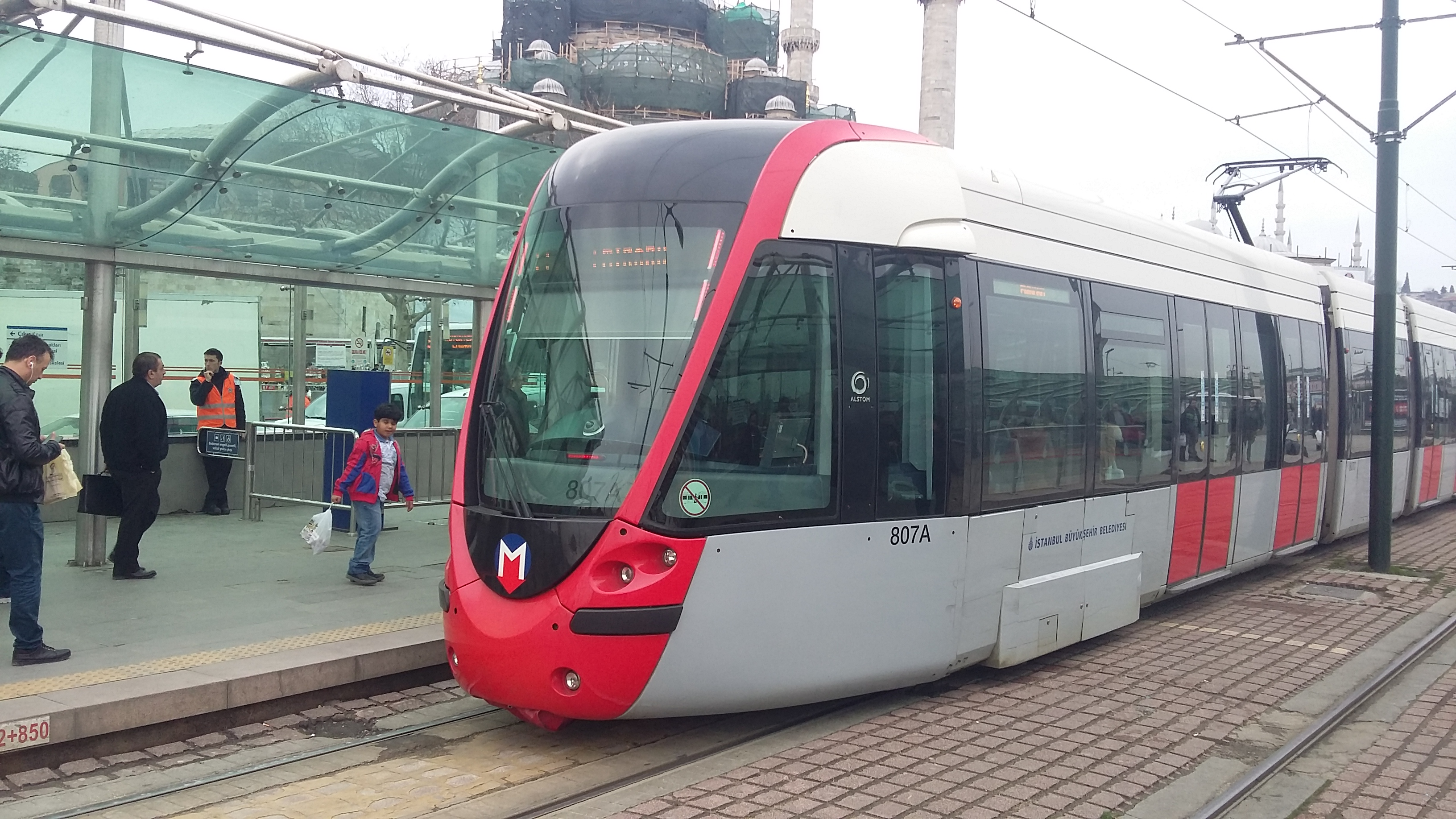 Eminönü